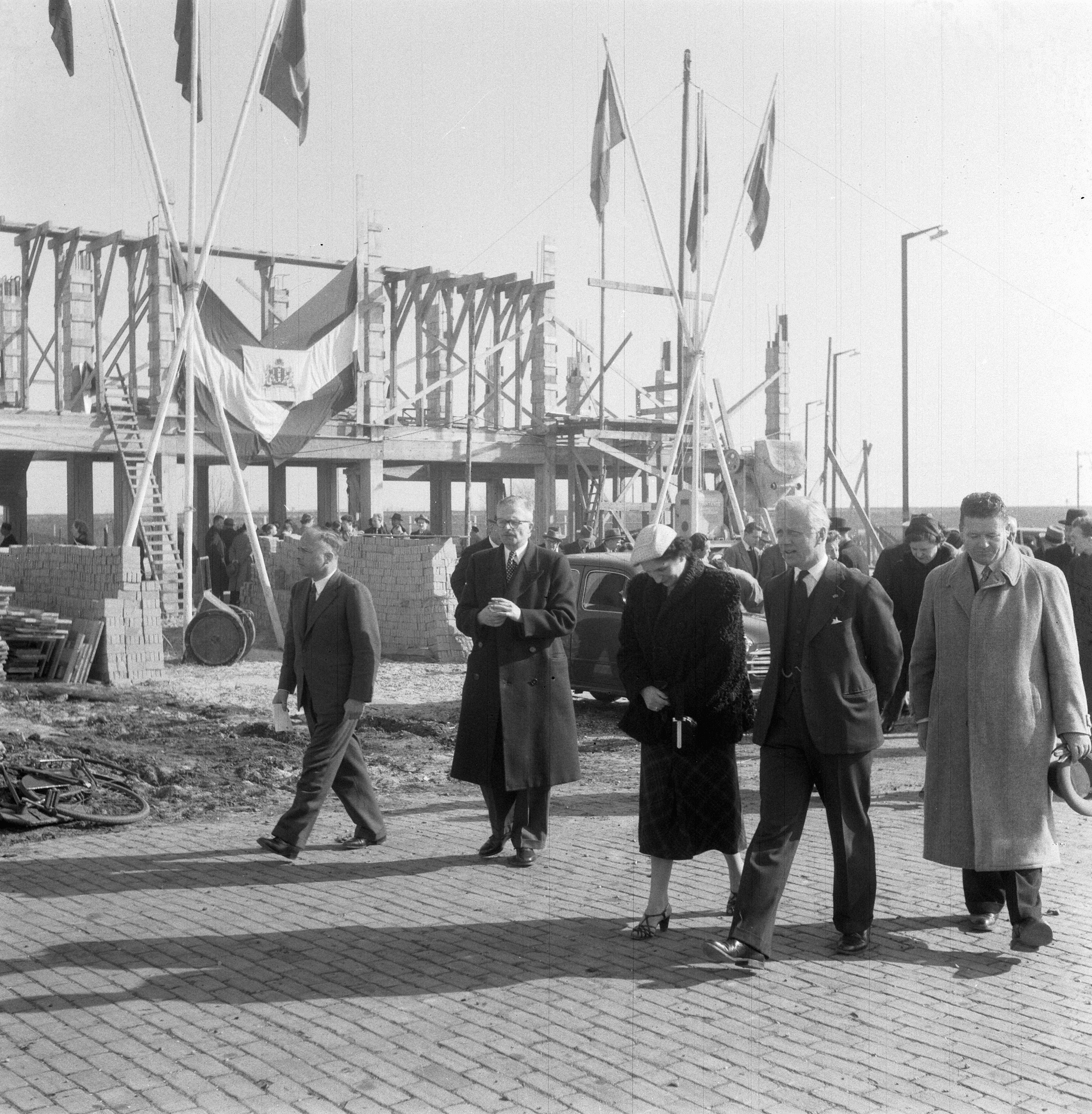 Collectie / Archief : Fotocollectie Anefo Reportage / Serie : [ onbekend ] Beschrijving : 1e Steenleg Fiatfabriek Amsterdam Oost Datum : 16 maart 1953 Fotograaf : Noske, J.D. / Anefo Auteursrechthebbende : Nationaal Archief Materiaalsoort : Negatief (zwart/wit) Nummer archiefinventaris : bekijk toegang 2.24.01.03 Bestanddeelnummer : 905-6033 Reacties Geplaatst door Maaike op 19 januari 2014 - 22:08. Amsterdam, Amstel-industrieterrein. Eerste steenlegging Fiat assemblage-fabriek Burgemeester Arnold J. d'Ailly en echtgenote